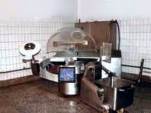 Kutter mit Entnahmevorrichtung